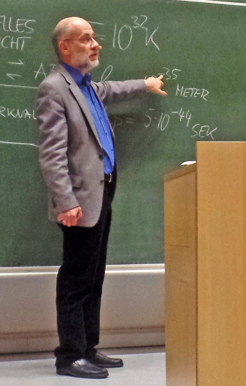 Prof. Harald Lesch; Jena am 26.09.2015 zur Veranstaltungsreihe "Highligths der Physik 2015"